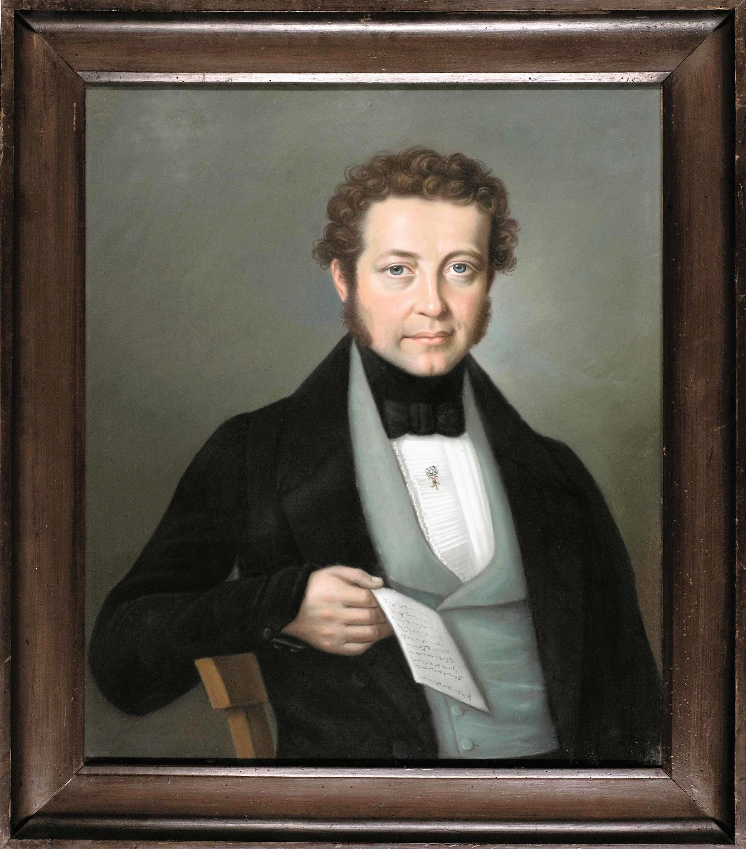 Gemälde: Carl Johann II. Elbers (1795–1853), Pastell ca. 1830, Unternehmer, Stadtverordneter und Kommerzienrat. – Er gründete 1822 in Hagen eine Textildruckerei und -färberei (Textilfabrik Elbers). Zur Mitte des 19. Jahrhunderts zählte Elbers’ Firma zu den leistungsfähigsten Unternehmen der Textilbranche in den Ländern des Deutschen Bundes. – Herkunft/Rechte: Stadtmuseum Hagen / Heike Wippermann (RR-R).